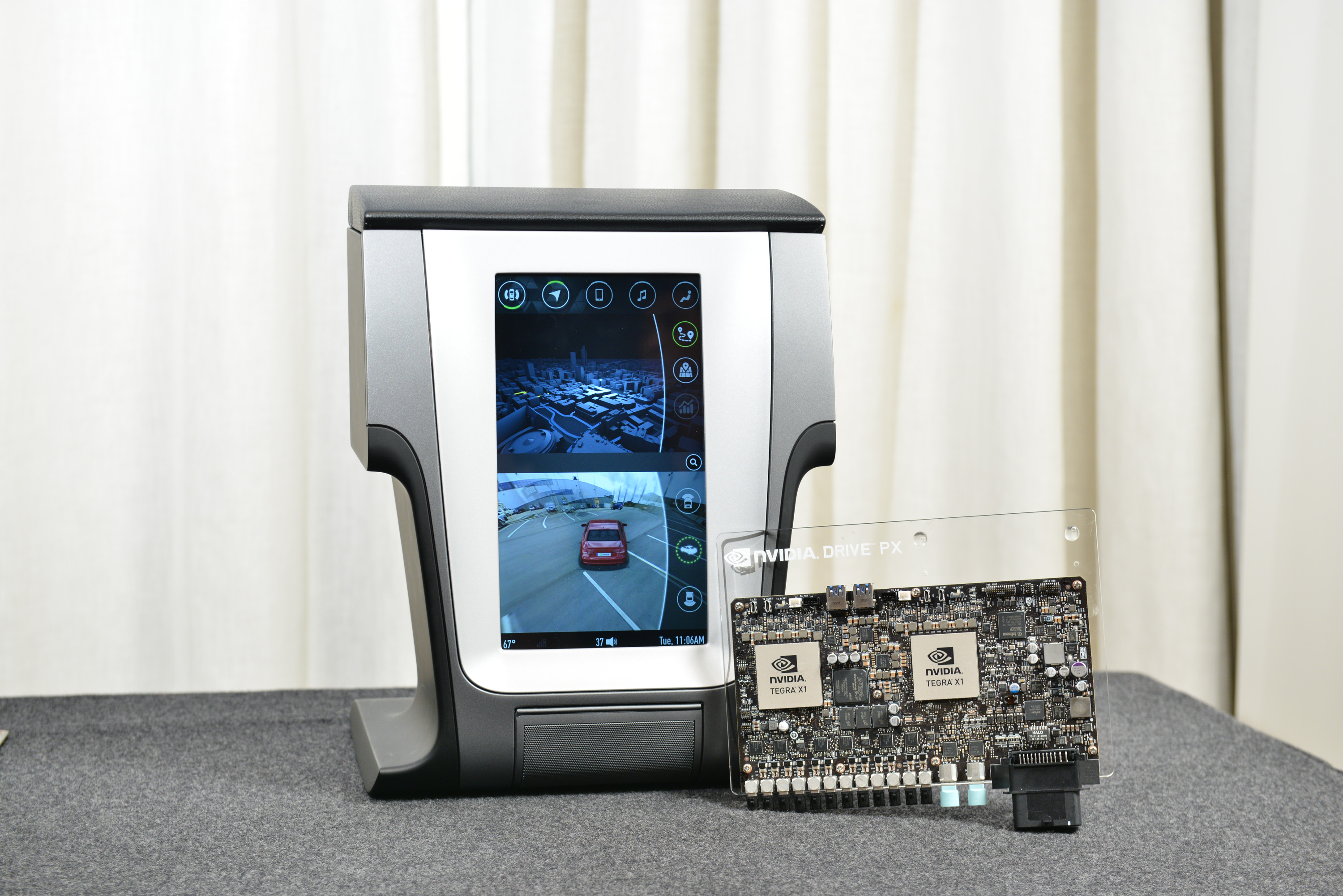 中文（台灣）: 2015台北國際電腦展，NVIDIA Drive PX。